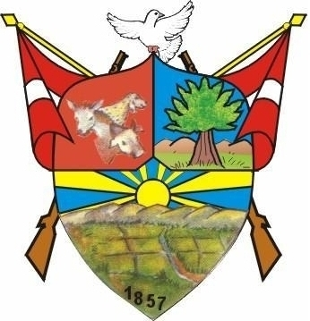 Escudo del distrito de Suyo